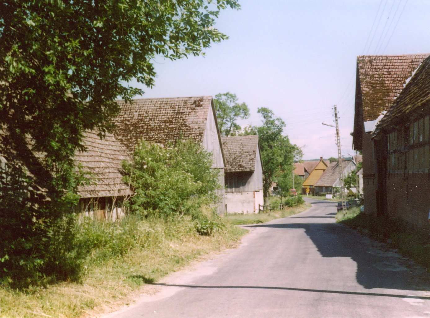 Starkowo